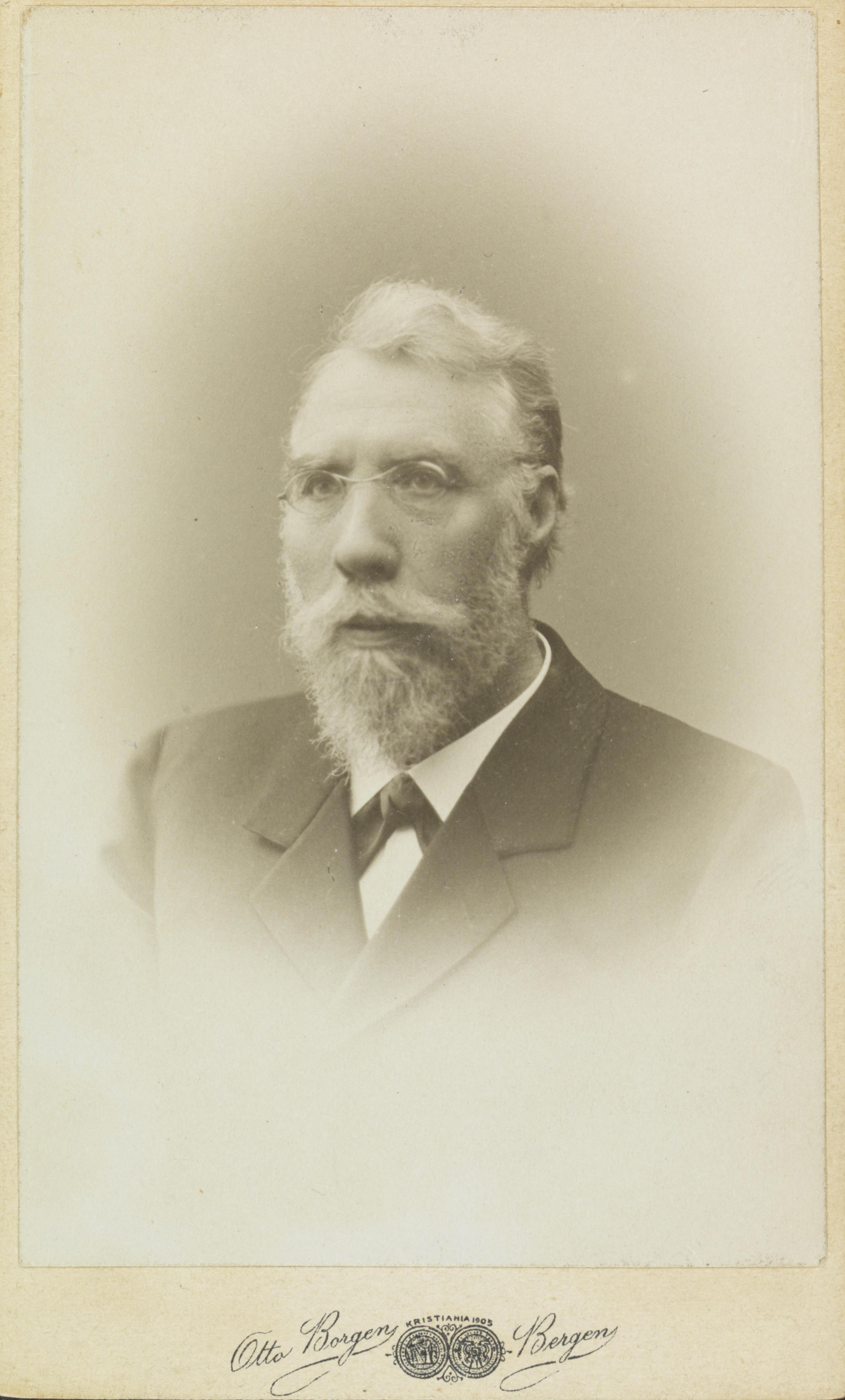 Dosent John Utheim, ca. 1908. Fotograf: Otto Borgen (1877-1958) Eier: Nasjonalbiblioteket